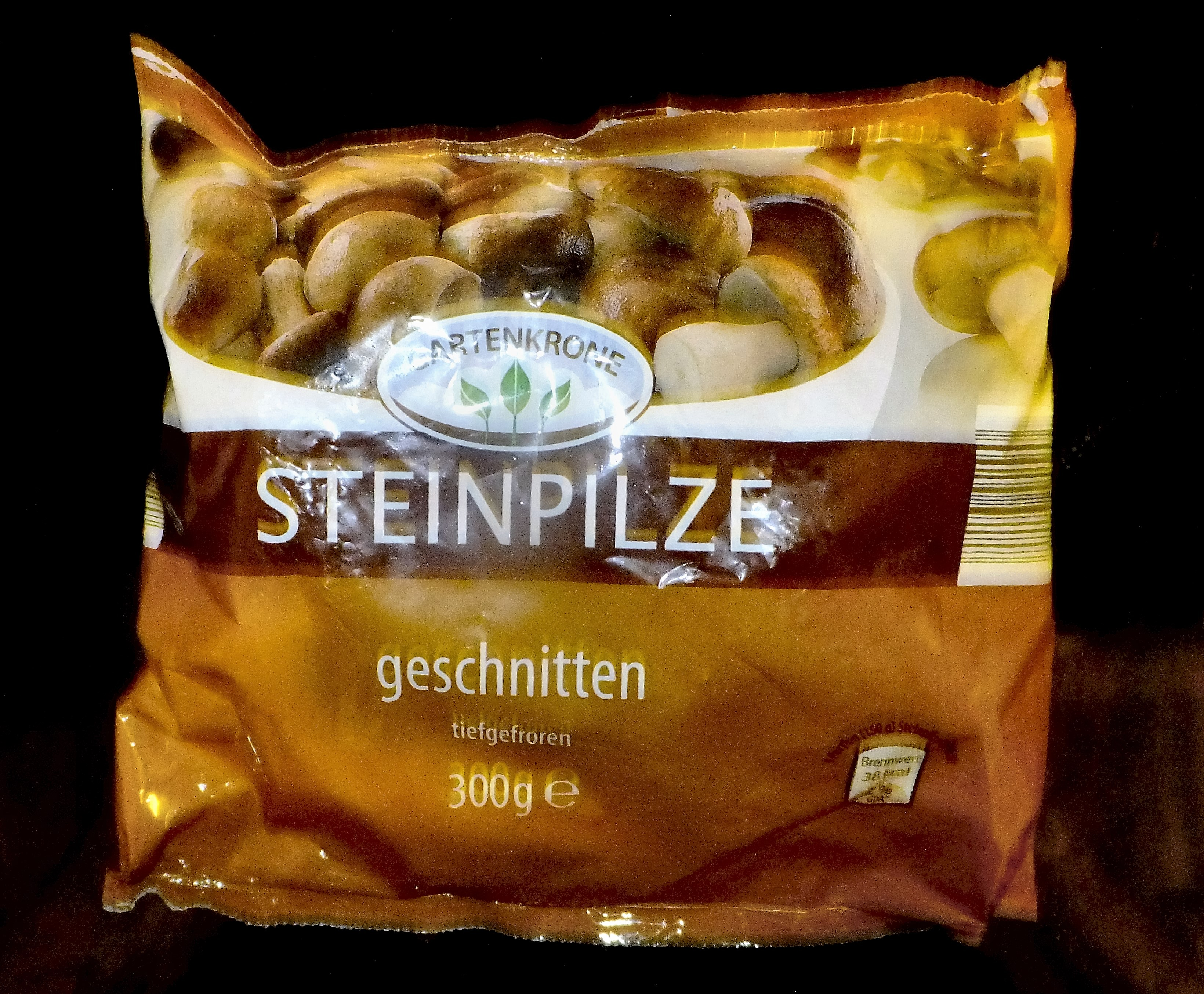 Steinpilze TK